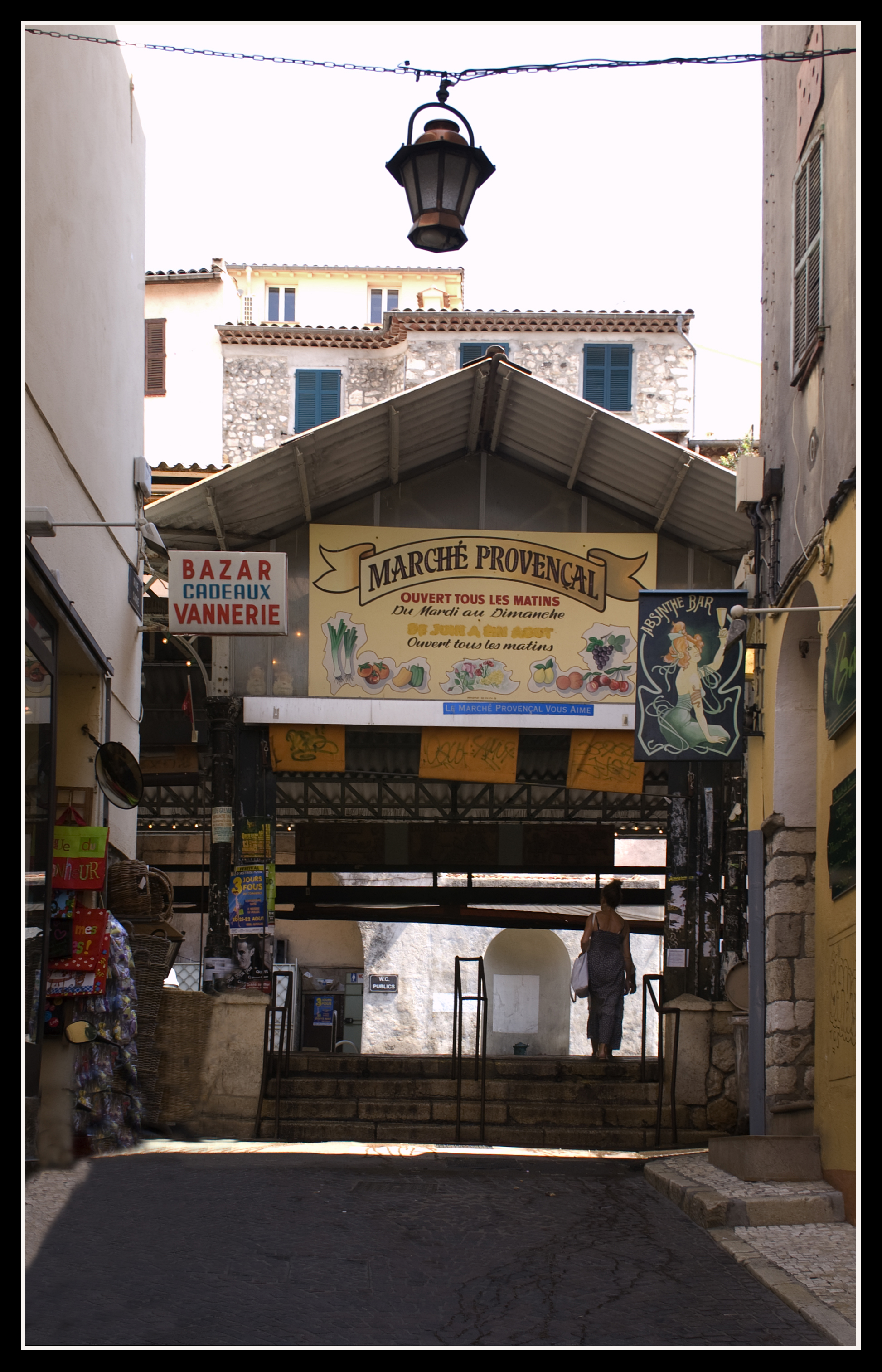 Marché Provençal.Antibes.